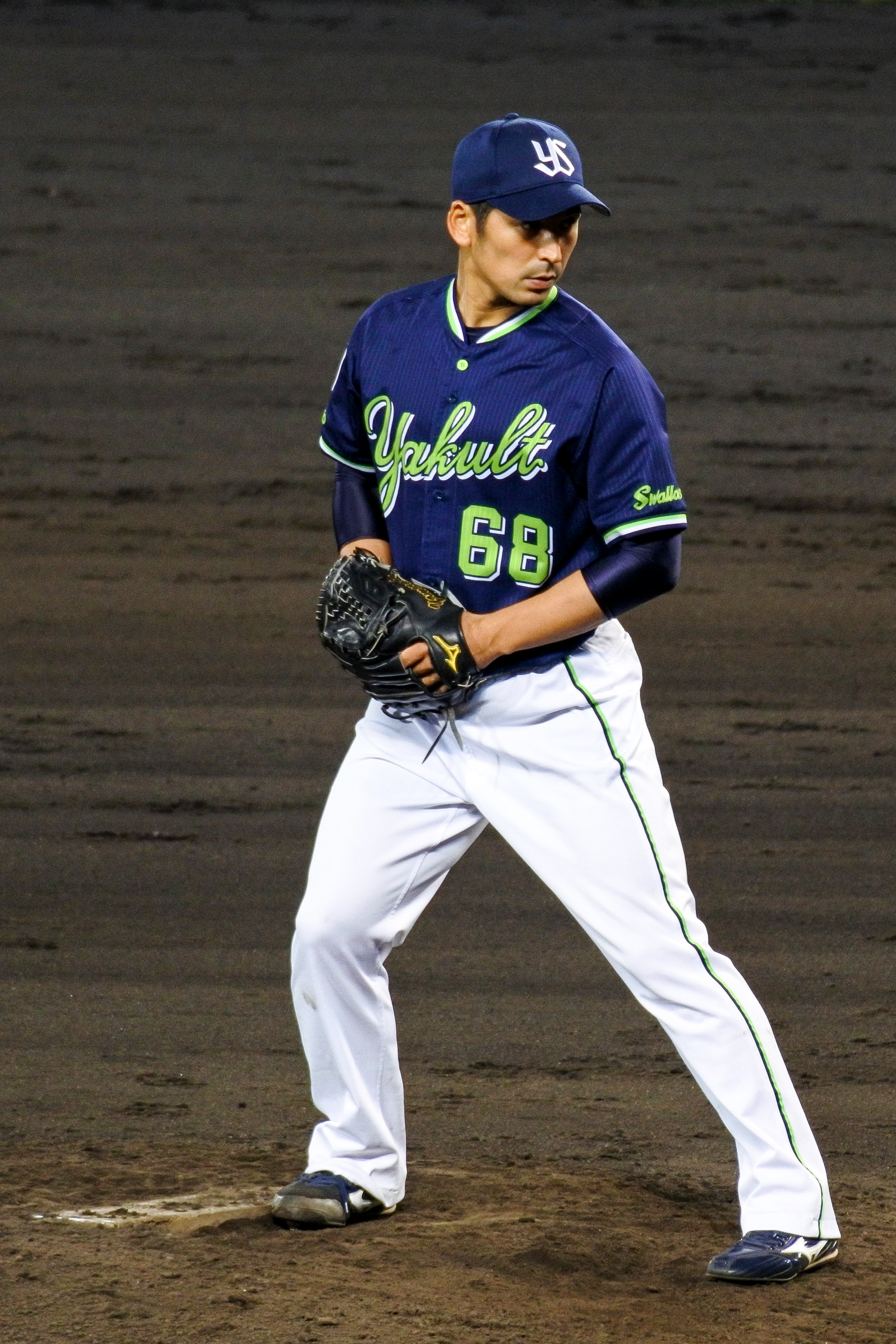 2016年4月20日 ヤクルト×阪神戦（甲子園球場）